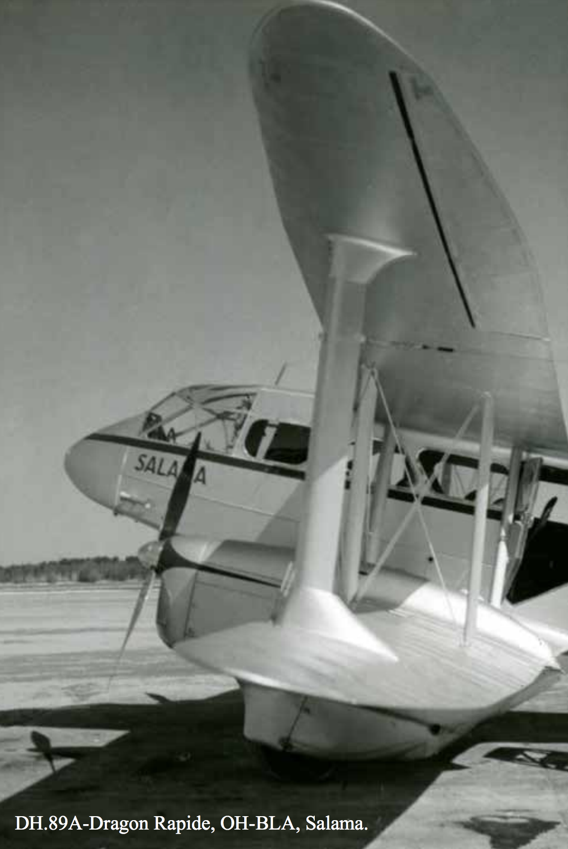 Aero O/Y:n lentokone De Havilland Dragon Rapide “Salama”.